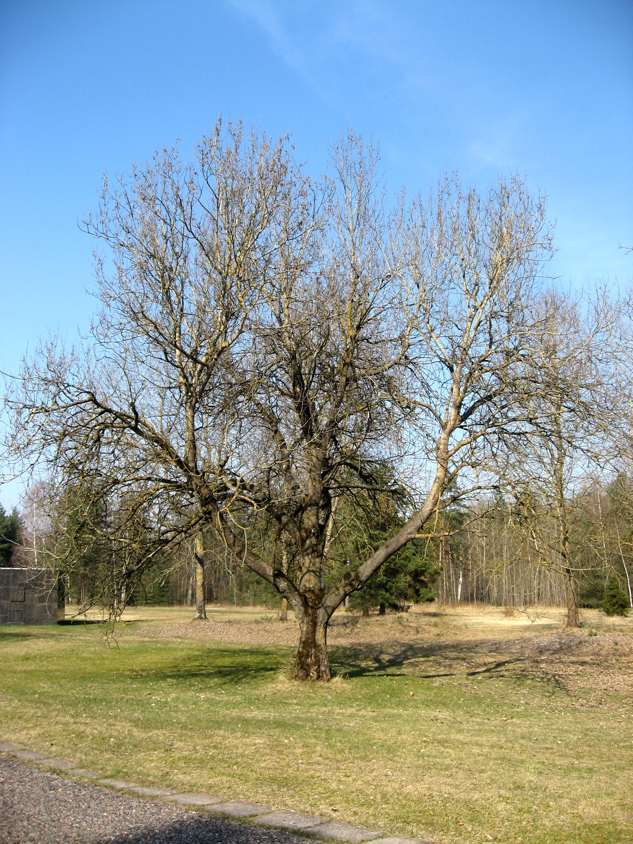 Strom (Fraxinus excelsior) poblíž Salaspilsu